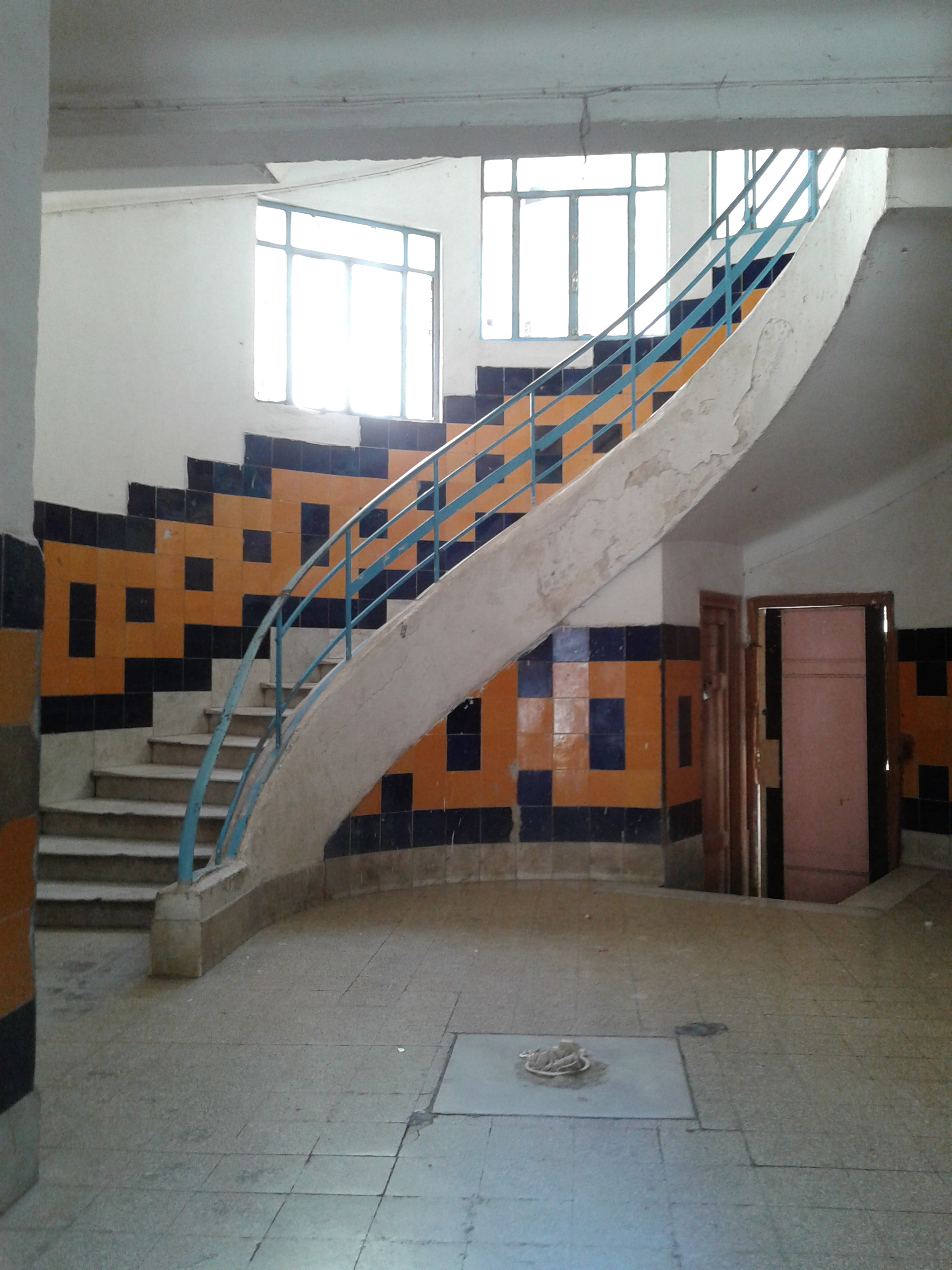 Cage d'escalier d'un des immeubles de recasement d'el Hafsia